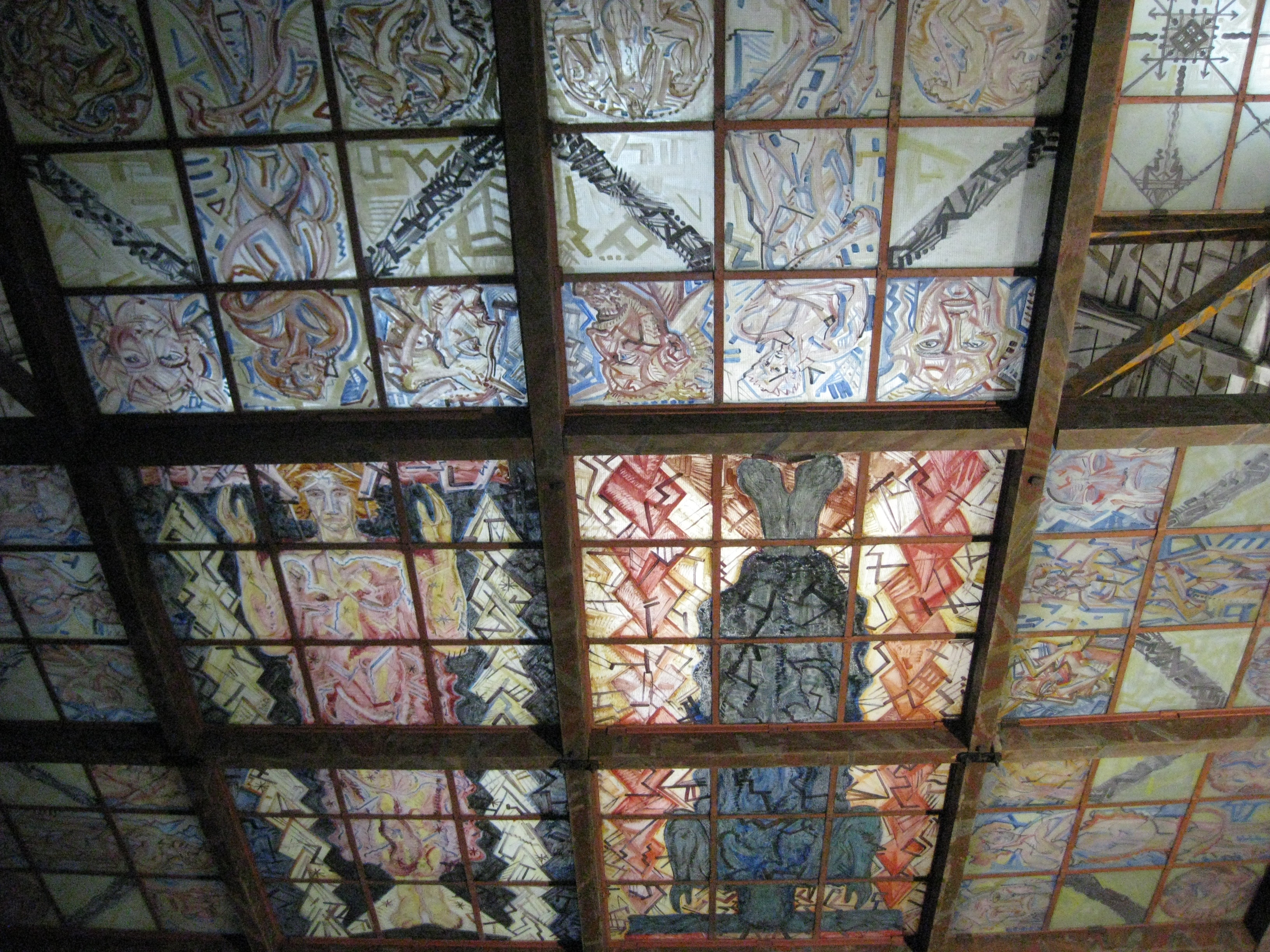 Wohnung und Atelier des Künstlerehepaars Bossard in der Lüneburger Heide, heute öffentliches Museum